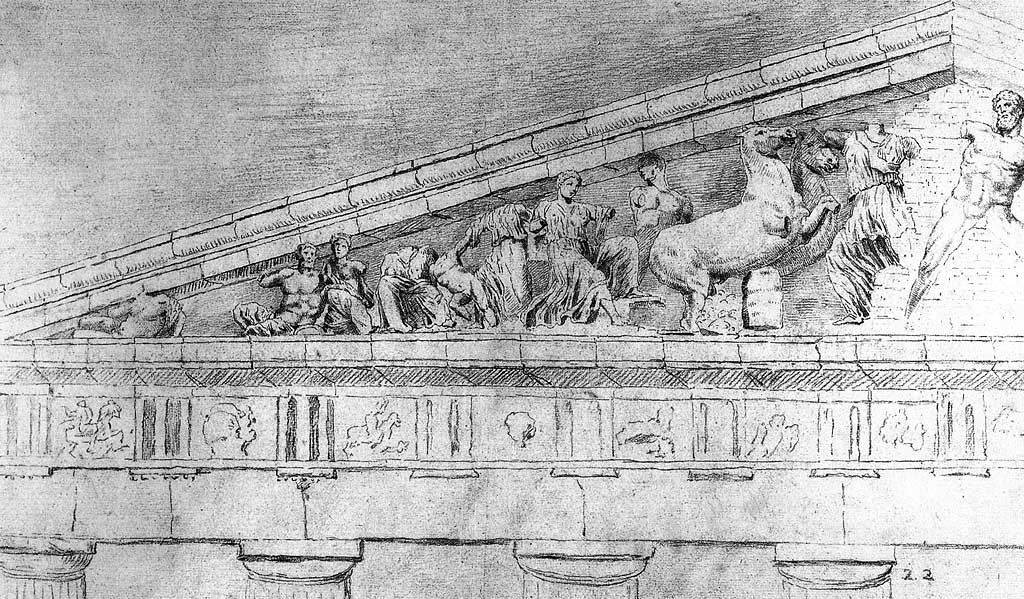 Фронтон Парфенона